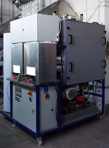 Pierwsza polska instalacja energetyczna (mikro-kogeneracyjna) z wysokotemperaturowymi ogniwami paliwowymi (SOFC)